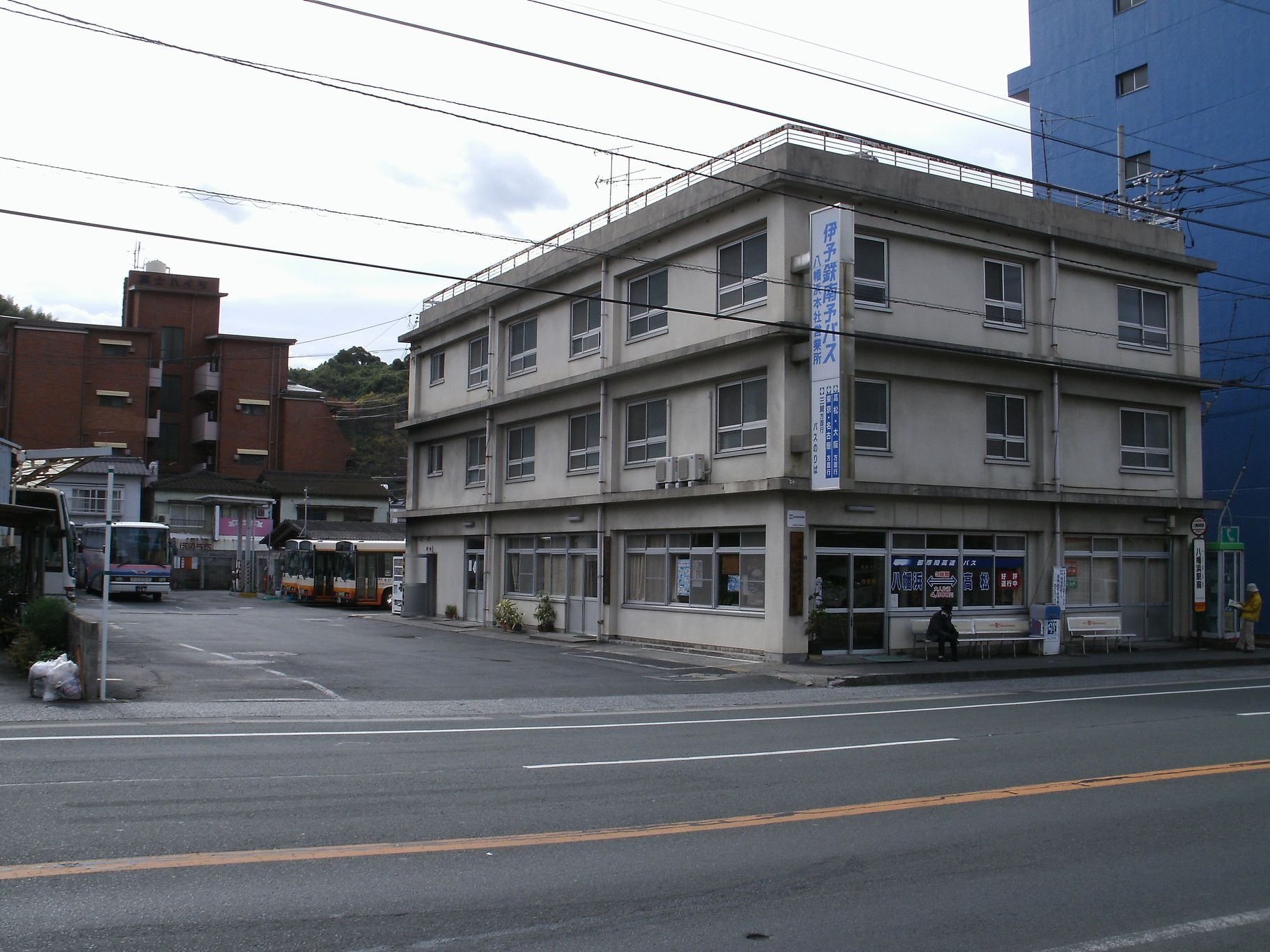 伊予鉄南予バス本社